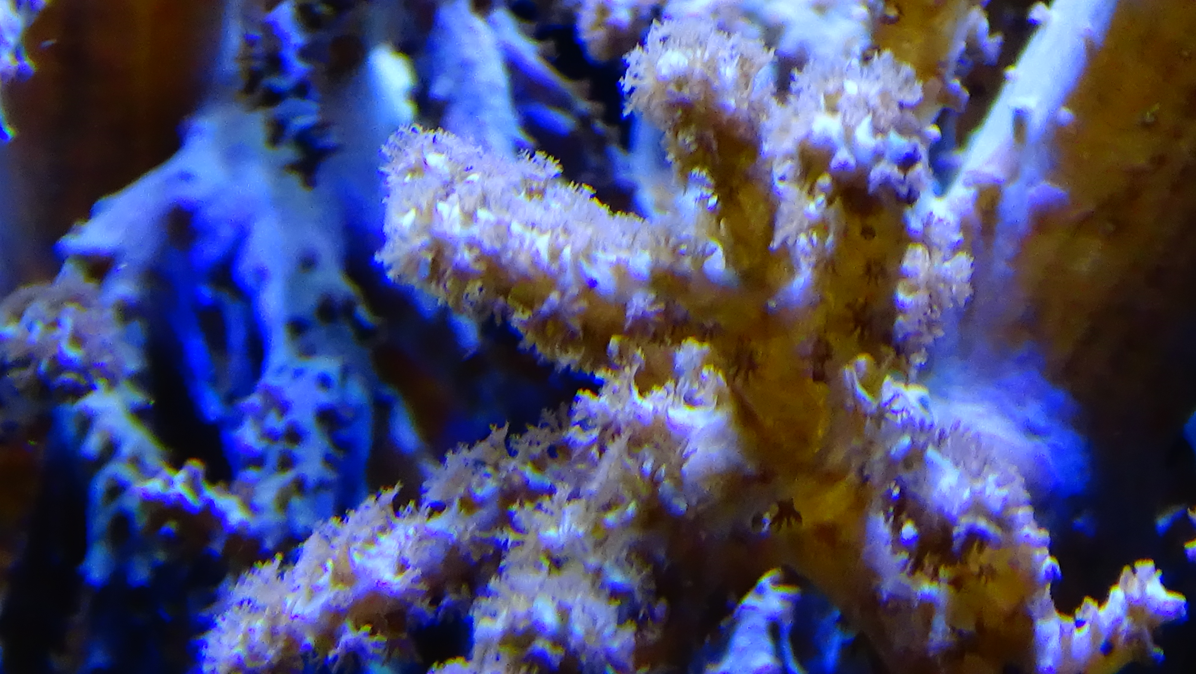 Litophyton arboreum - corail brocoli - Aquarium de la Porte Dorée - 11/2014